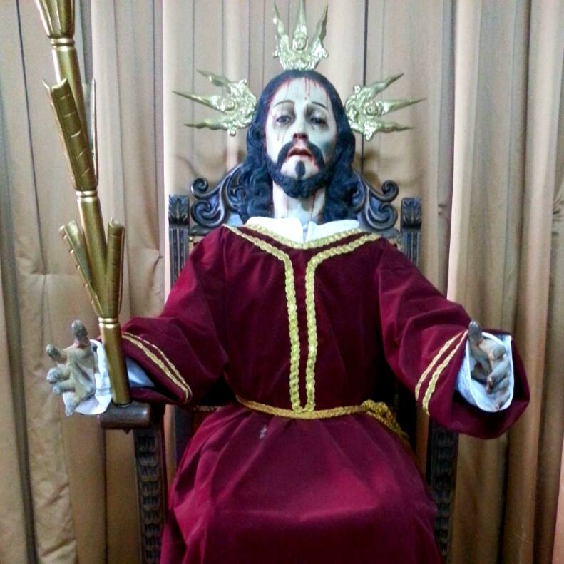 Amo Jesús de Yanaconas. Imagen Quiteña del Siglo XVI.